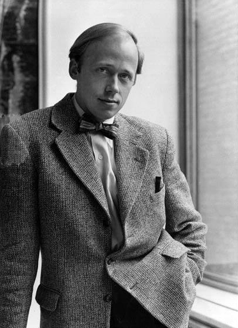 Regissören Mats Johansson.